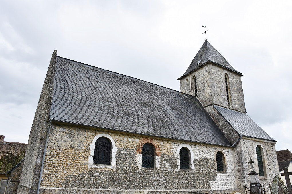 Église Sainte-Marie-l'Égyptienne de Sainte-Marie-au-Bosc (76).